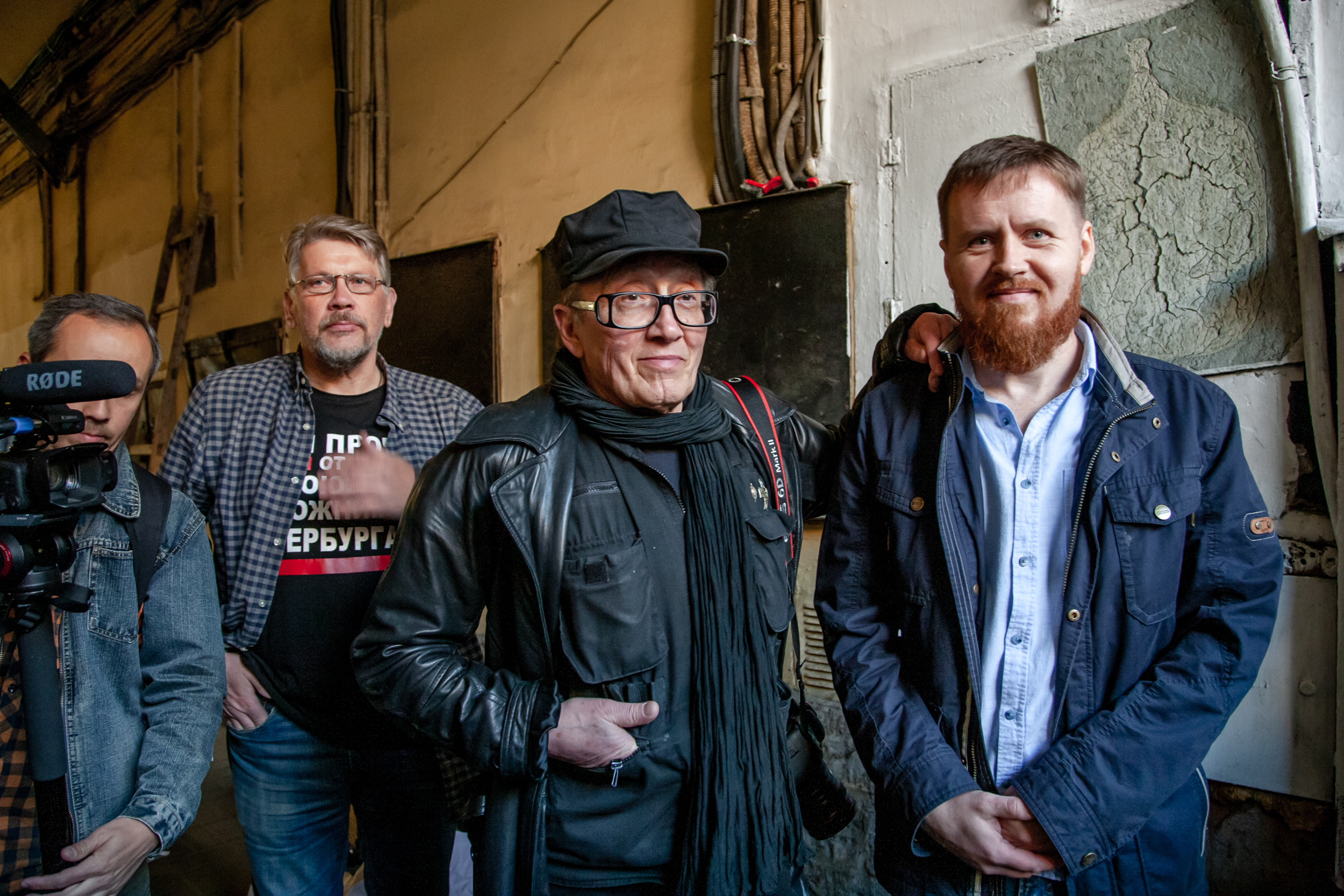 Урбанфреско с Михаилом Шемякиным